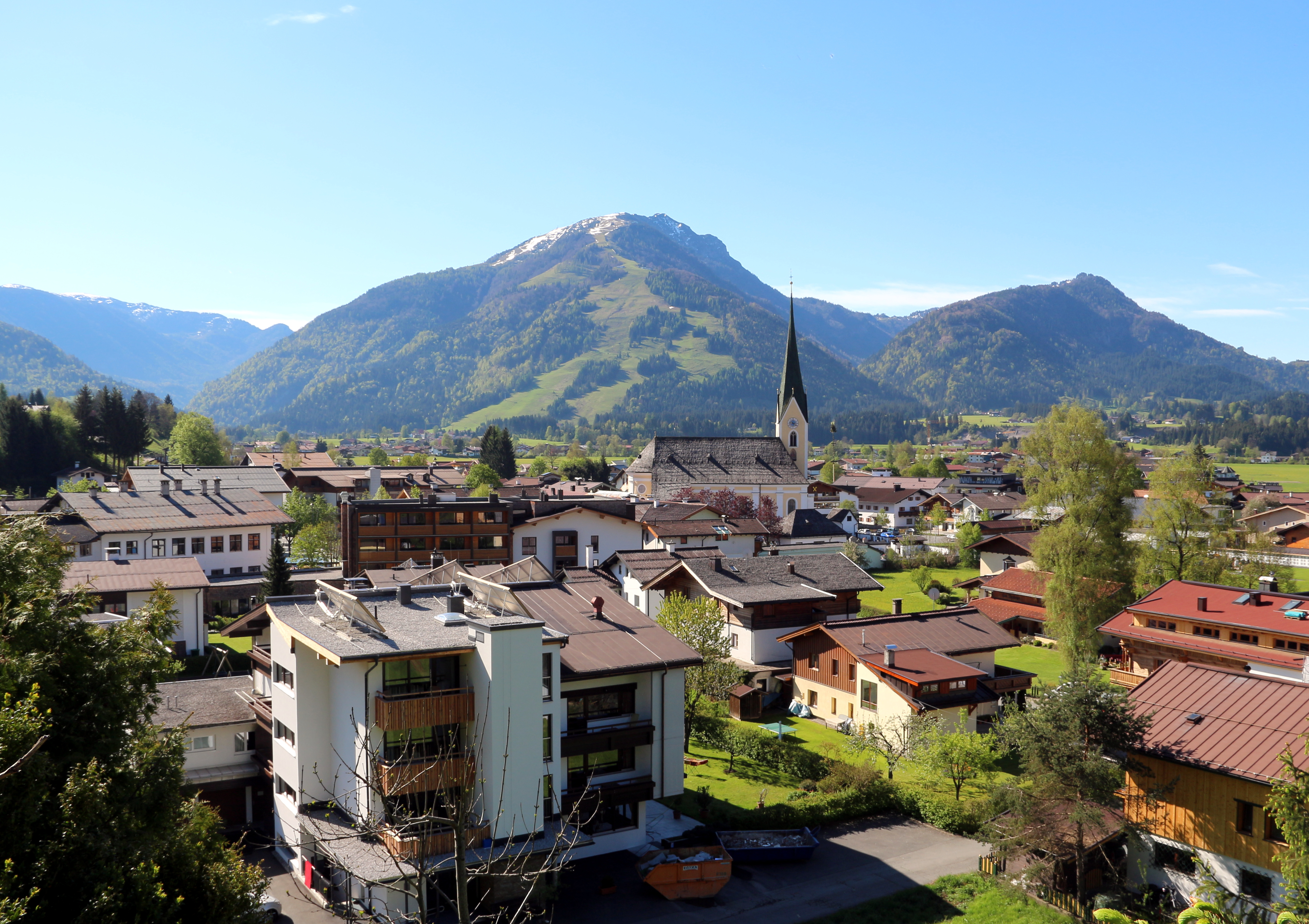 Ortsansicht Kössen mit Unterberghorn im Hintergrund, Blickrichtung Südosten.